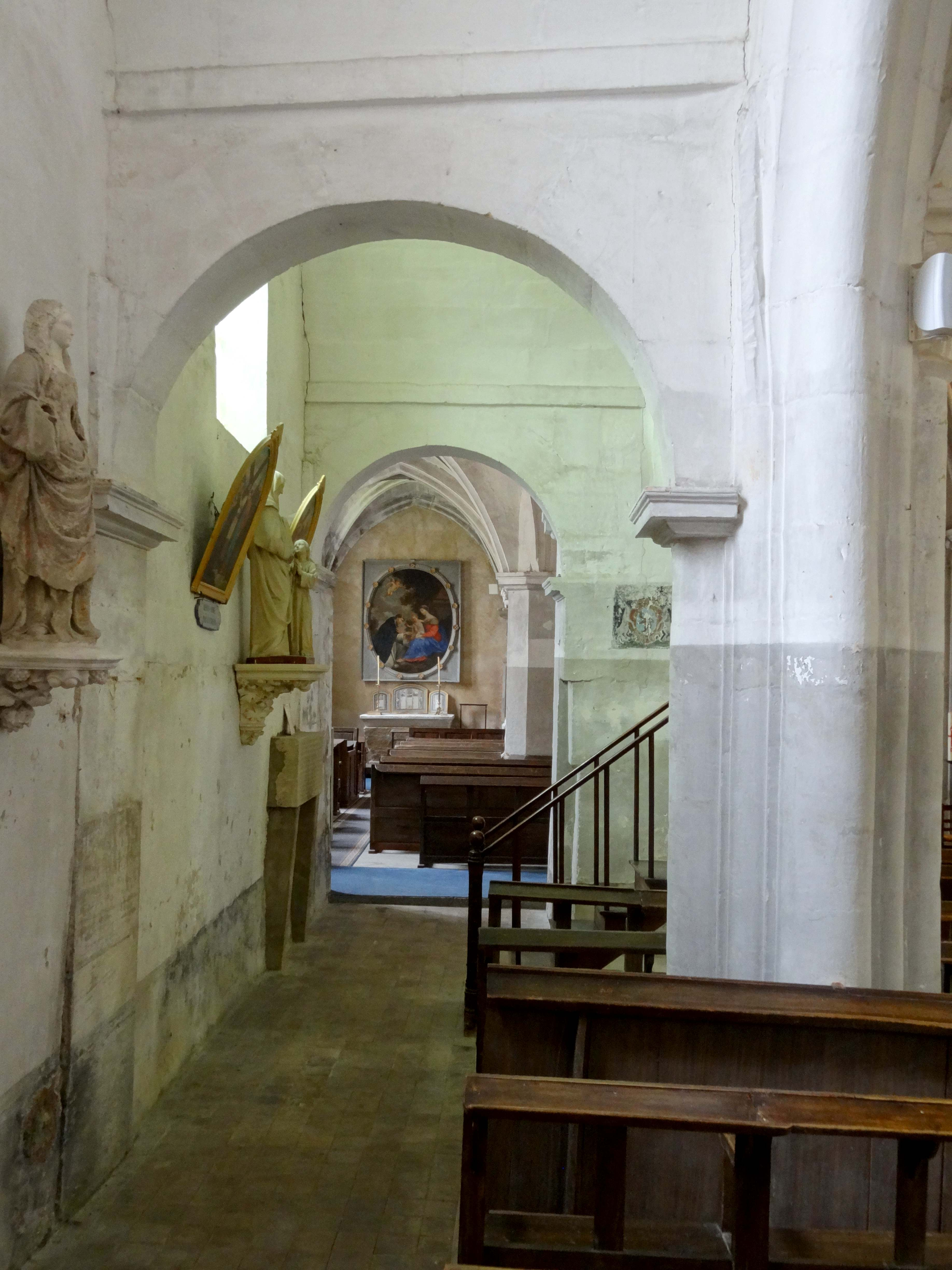 Intérieur de l'église - voir titre.